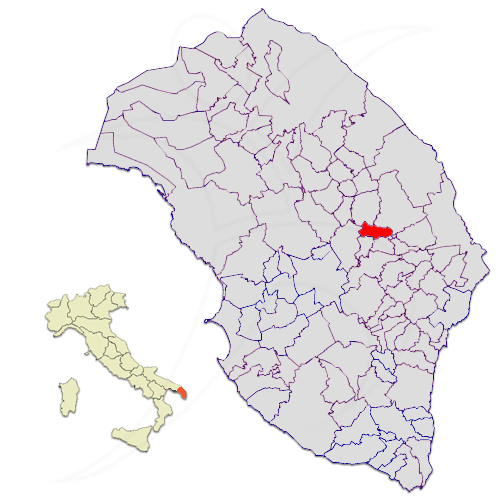 Il territorio dl comune di Castrignano de' Greci nella provincia di Lecce